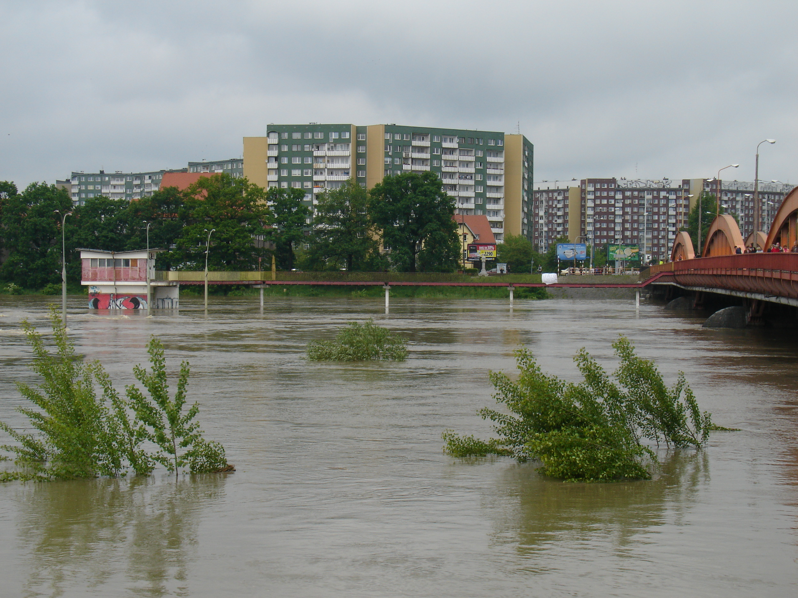 Odra i most Trzebnicki we Wrocławiu, sobota 22-05-2010, południe